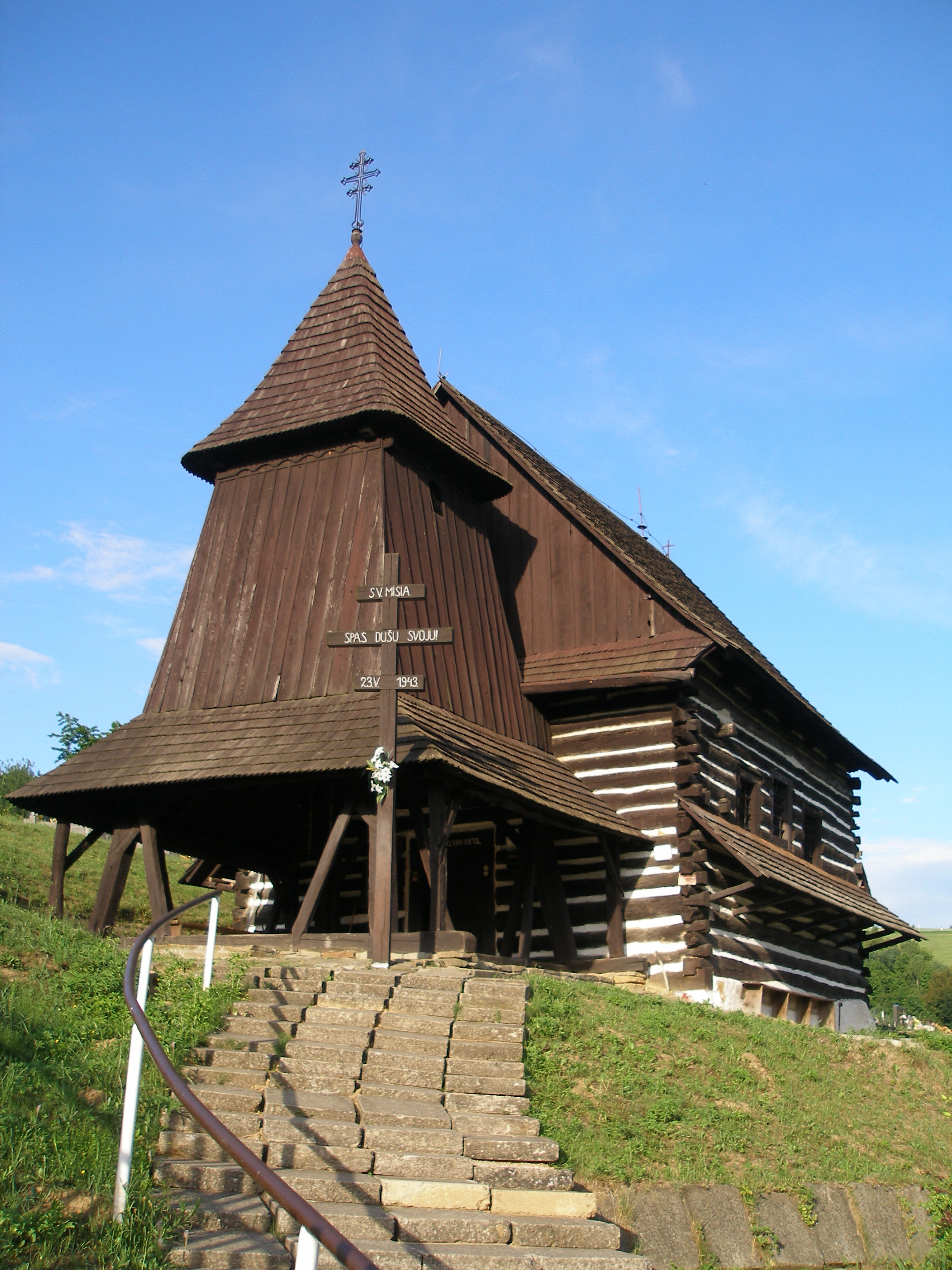 Národná kultúrna pamiatka,drevený kostolík v obci Brežany, región Šariš. This medium shows the protected monument with the number 707-272/0 in the Slovak Republic.